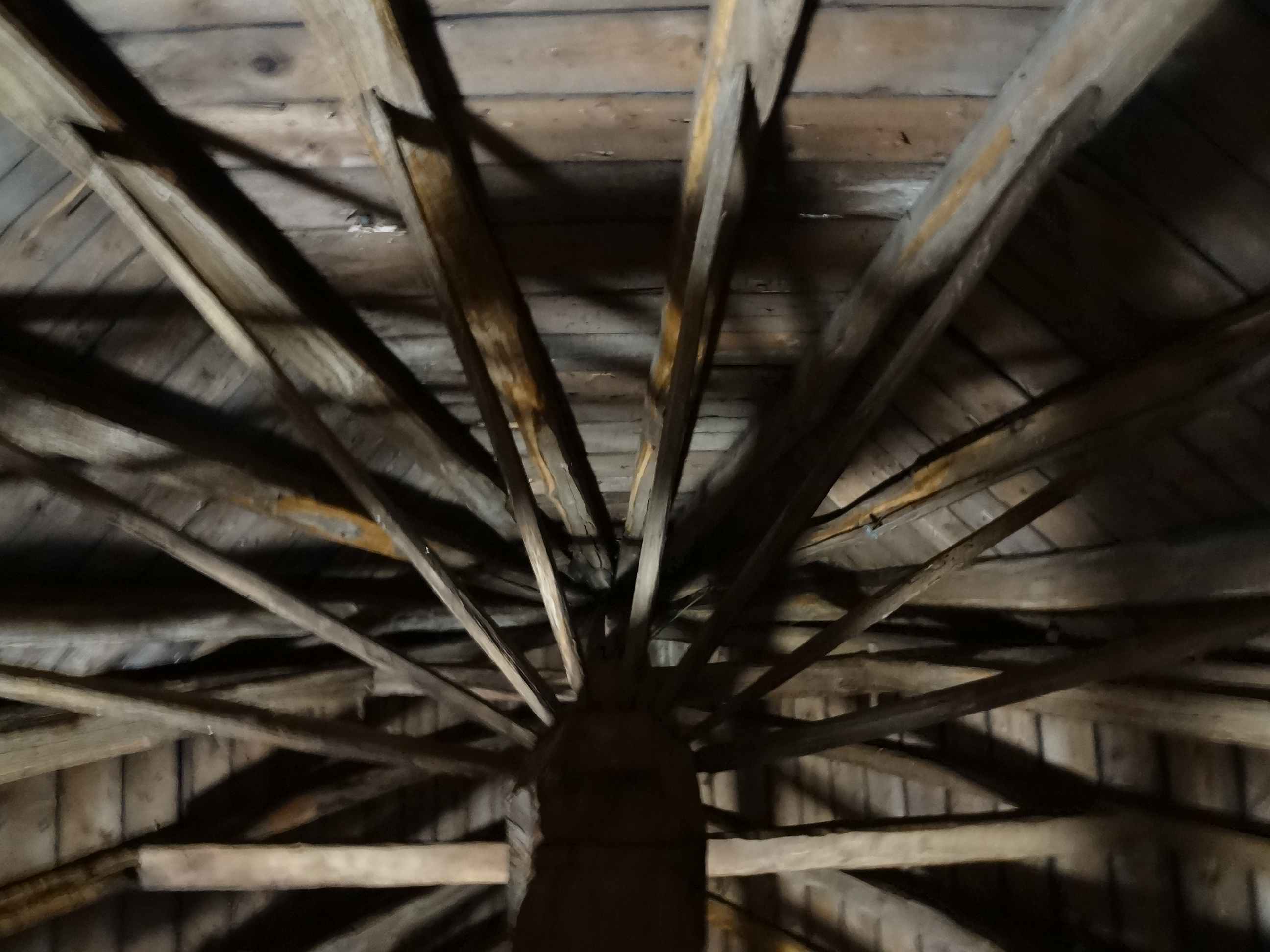 Evangelische Kirche Großen-Buseck